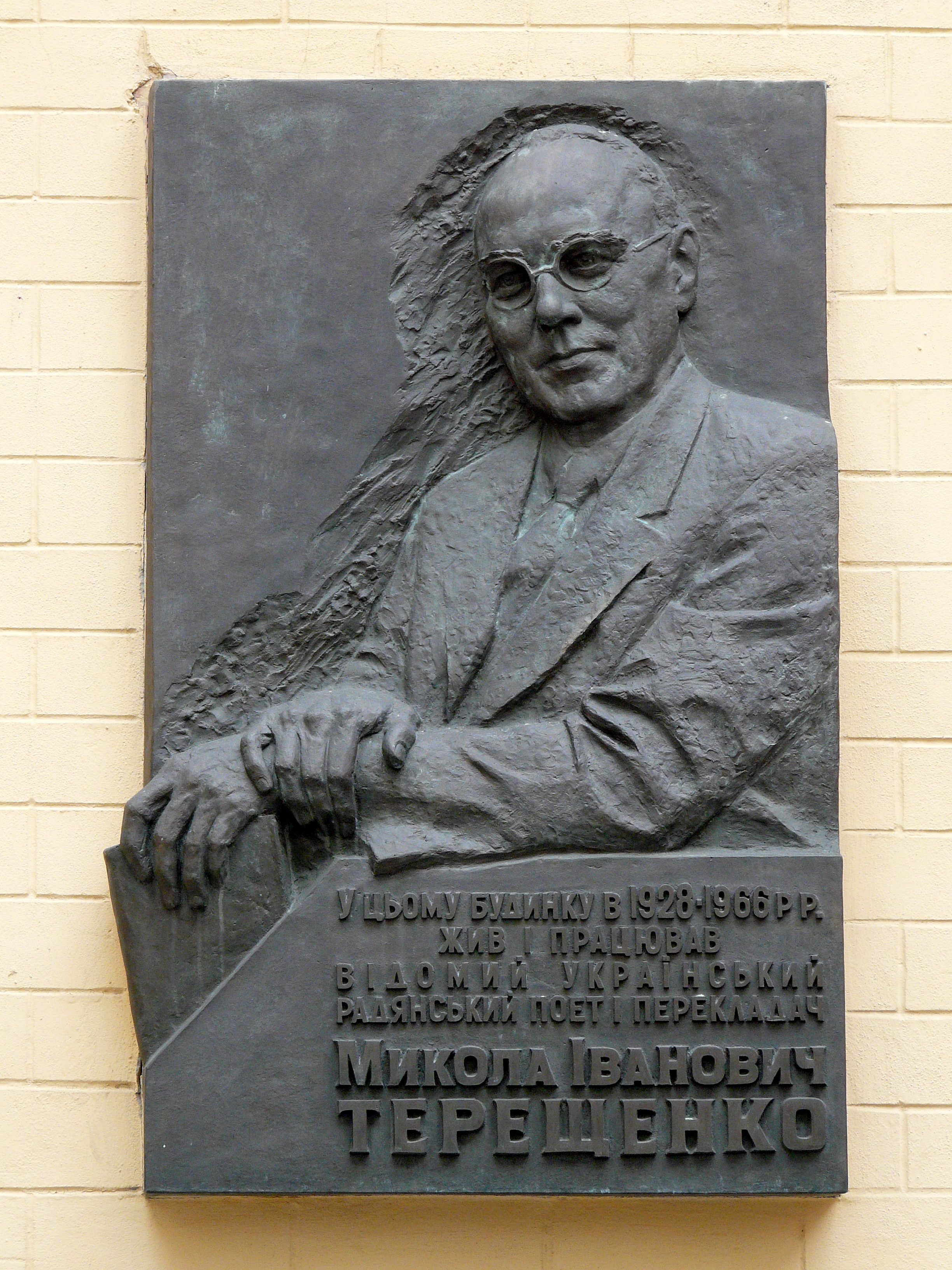 Флігель житловий, в якому у 1928–1966 рр. мешкав І. Терещенко, поет і перекладач, Київ, Володимирська вул., 51-а